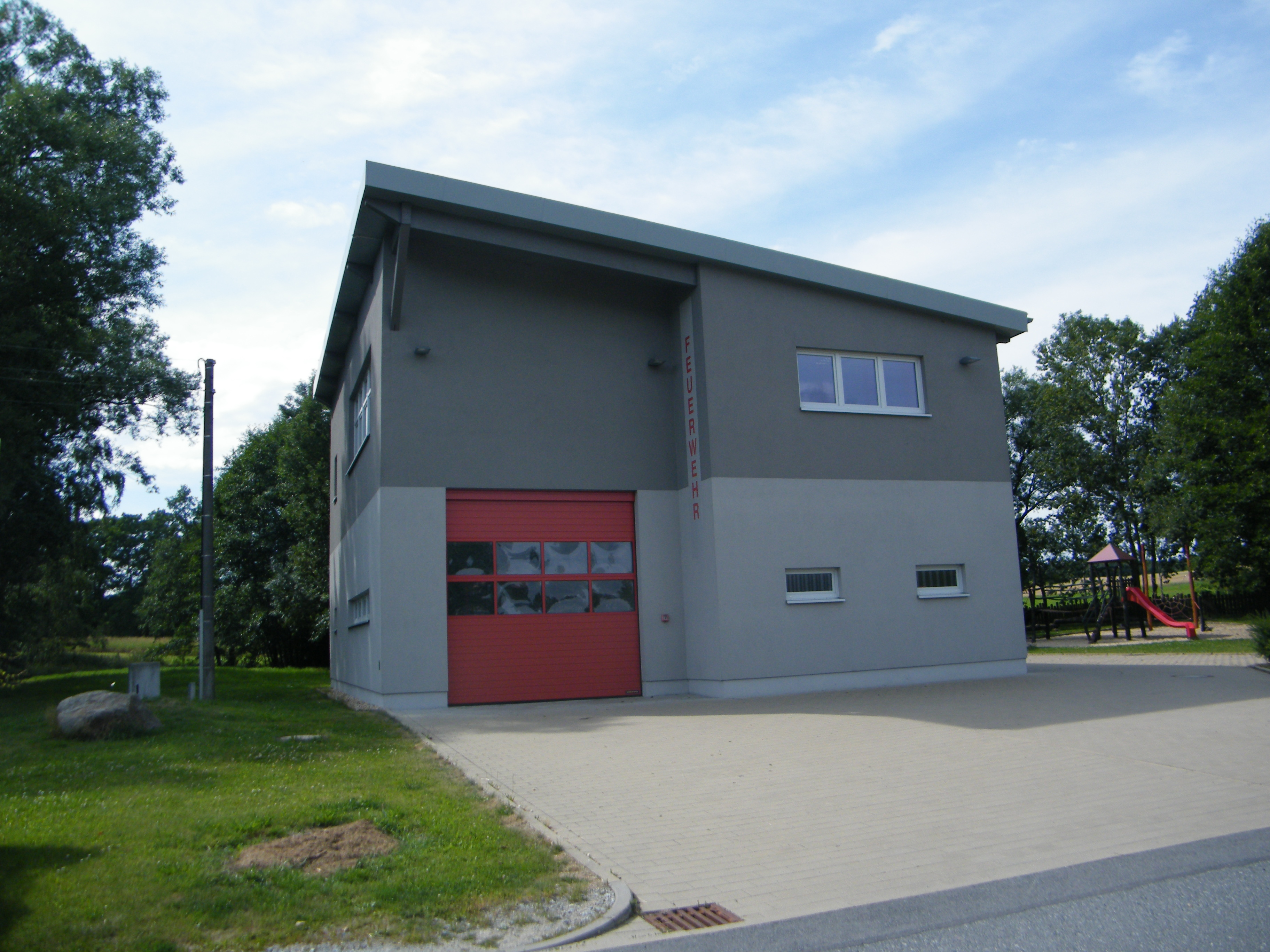 Rugiswalde, Feuerwehrhaus